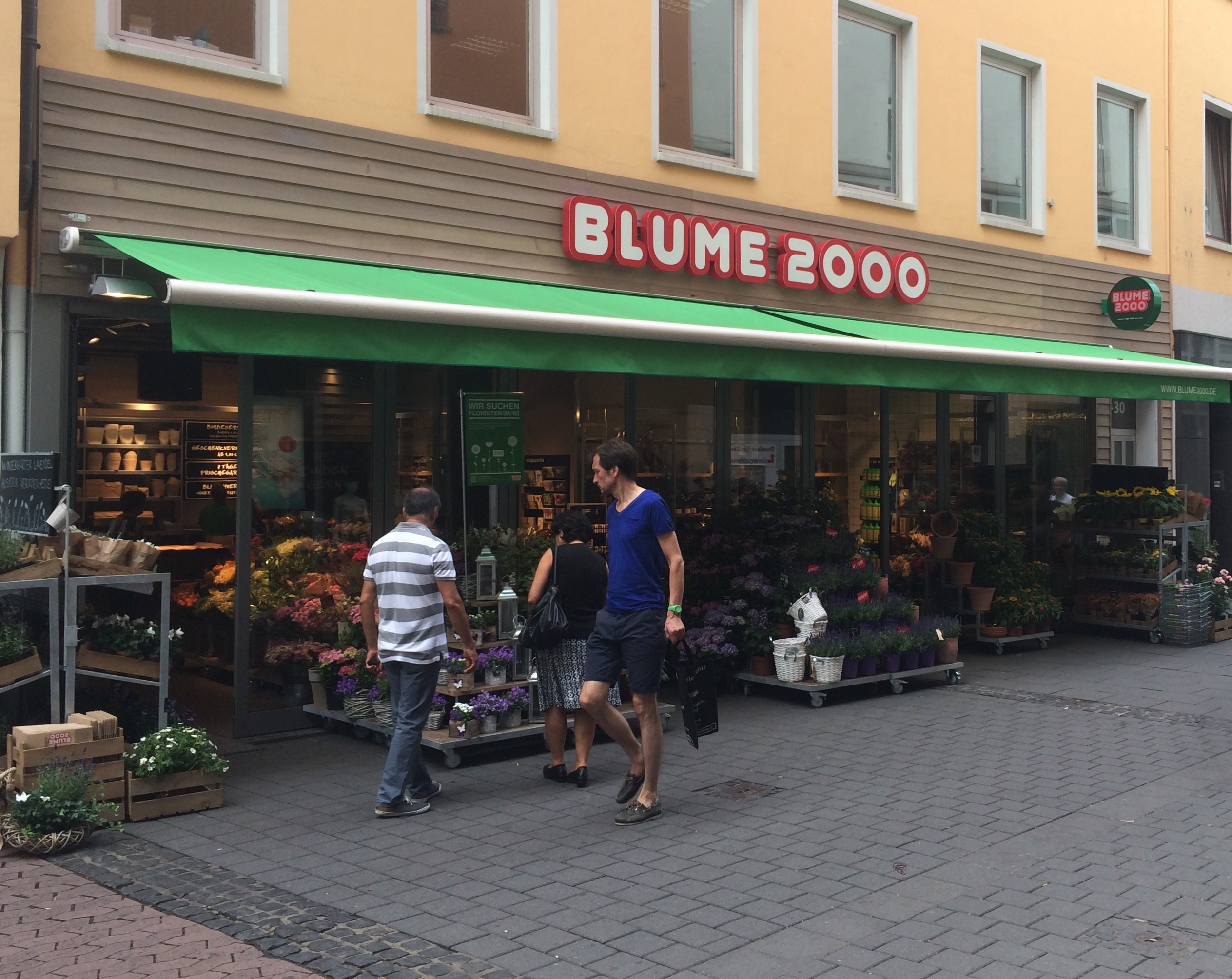 Blume 2000 Geschäft